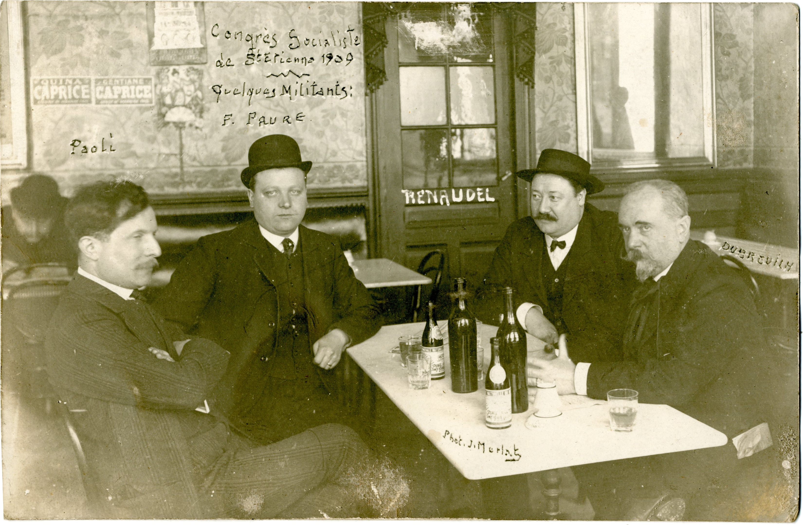 De gauche à droite : Paoli, Ferdinand Faure, Pierre Renaudel et Louis Dubreuilh.